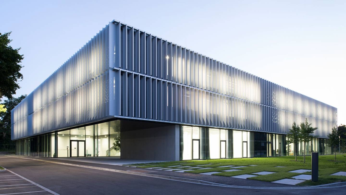 RMC-Neubau (Quelle: DLR CC-BY 3.0)